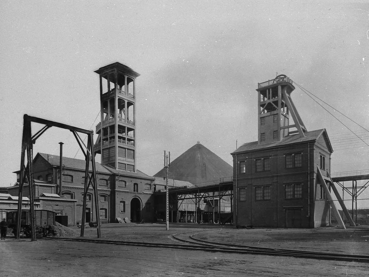 Fosse Saint Mark huit années avant sa fermeture, à Escaudain.